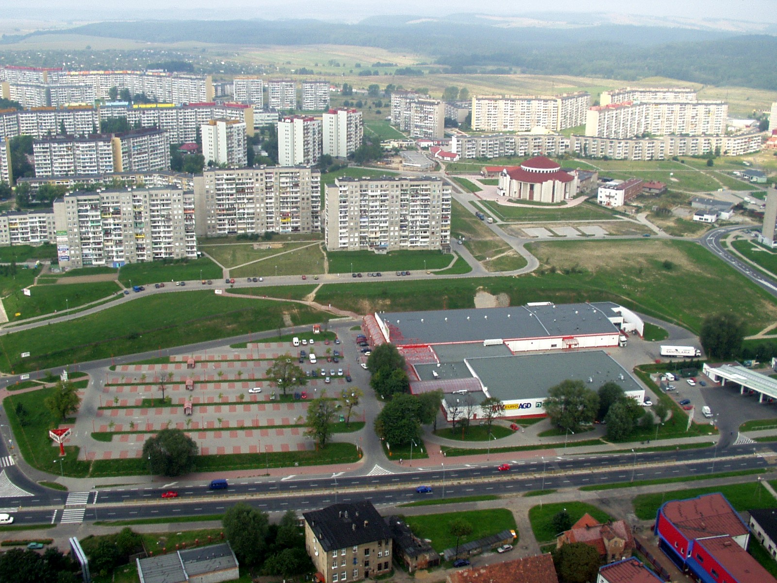 Wałbrzych-Podzamcze panorama. Autor zdjęcia: Ngapleaz